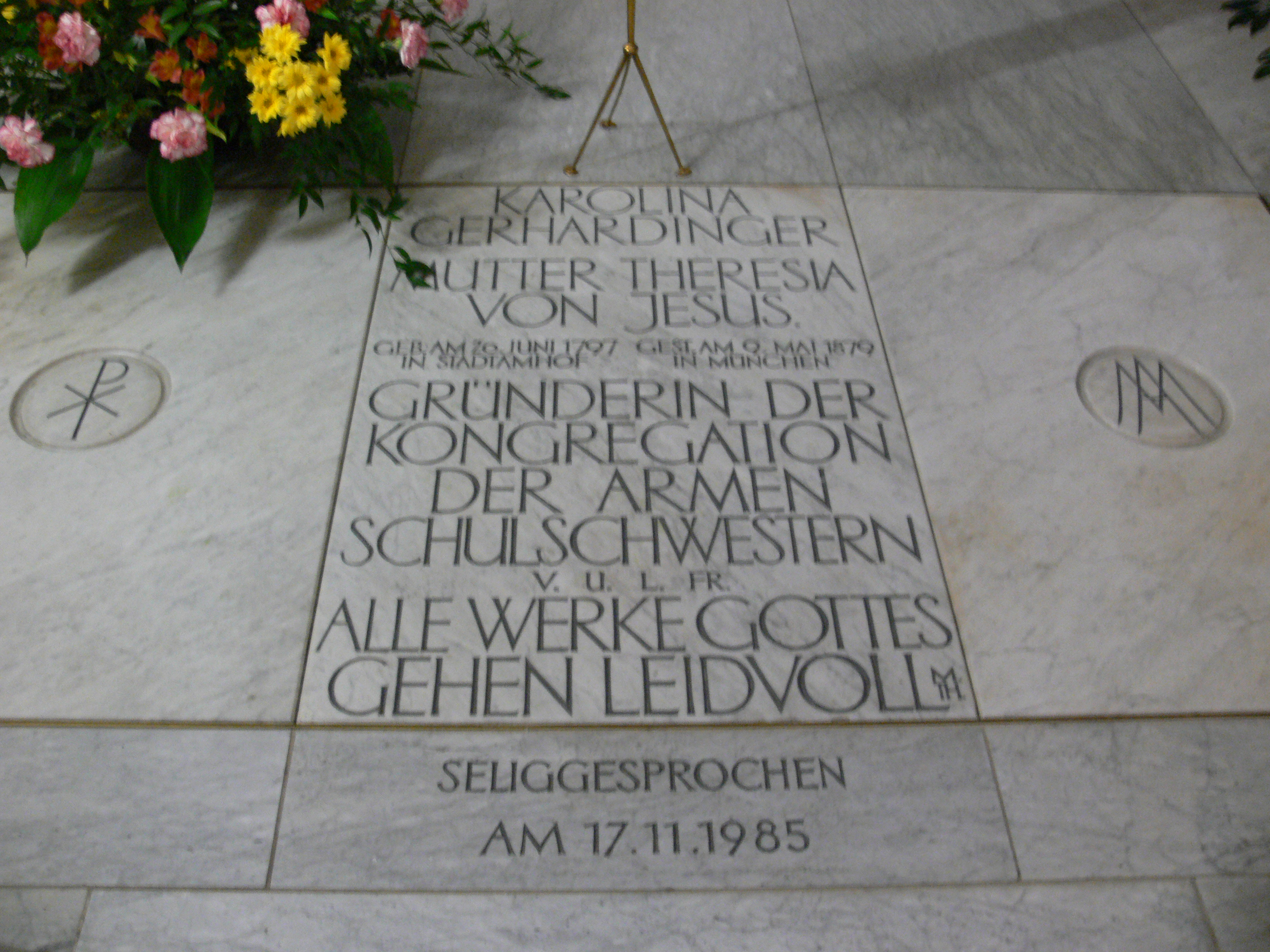 Katholische Kloster- und Institutskirche St. Jakob am Anger, Unterer Anger/St.-Jakobs-Platz, München, Grabmal Karolina (Theresia) Gerhardingers.